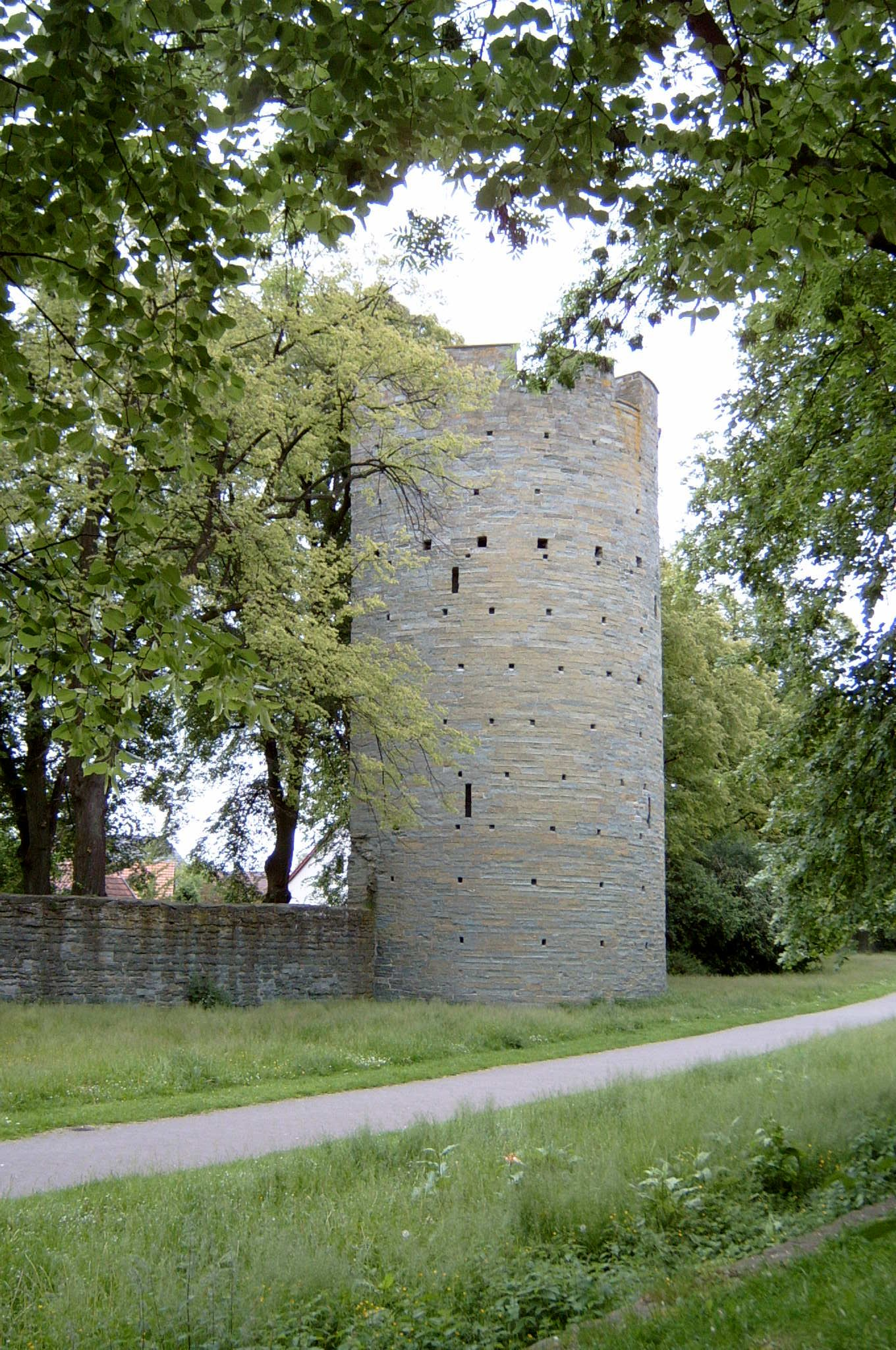 Soest in Westfalen, Stadtmauer, letzter Turm „Kattenturm“, Nähe Alter Schlachthof, gesehen von außerhalb der Wallmauer